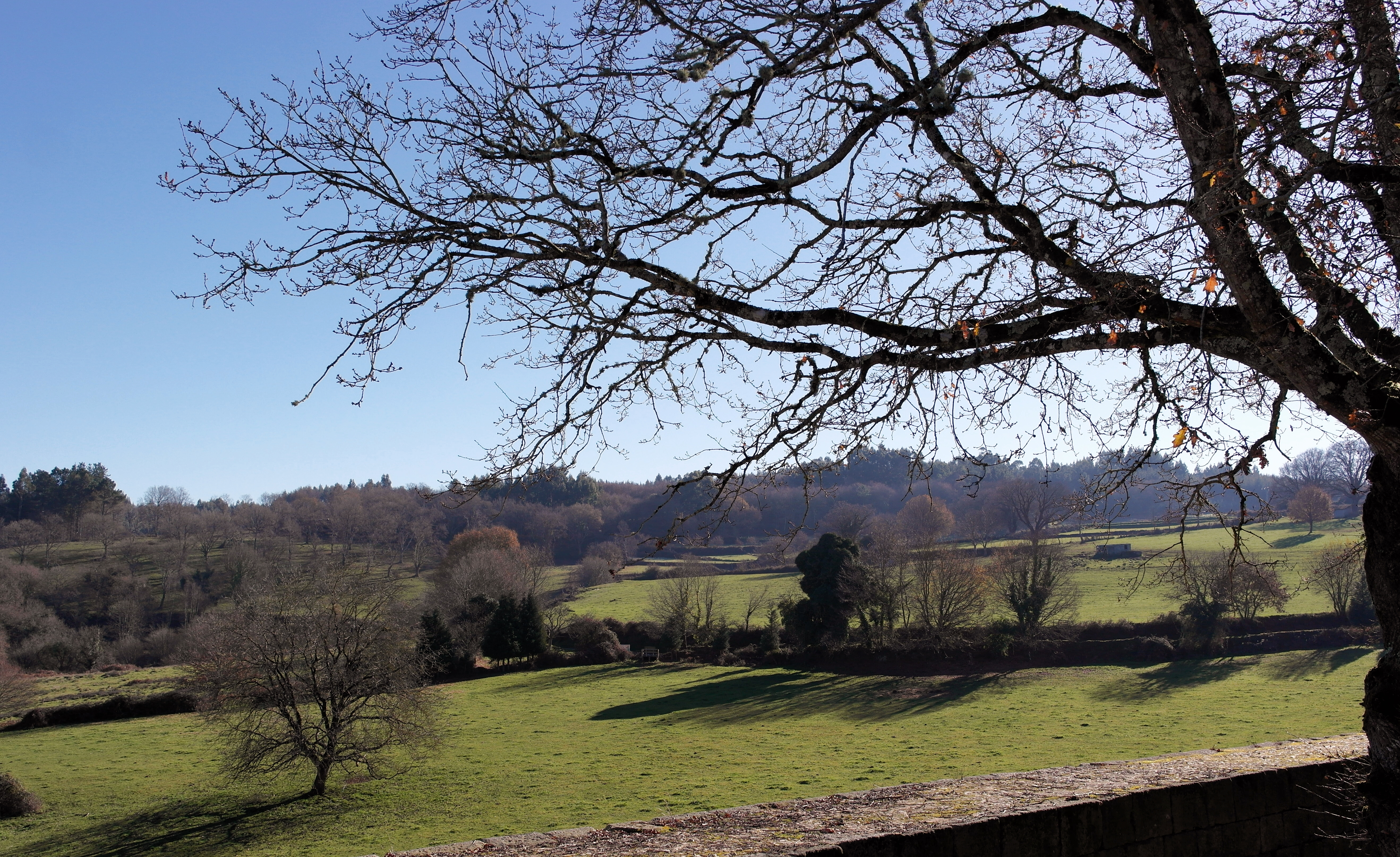 Vista desde o Castelo de Pambre, Palas de Rei